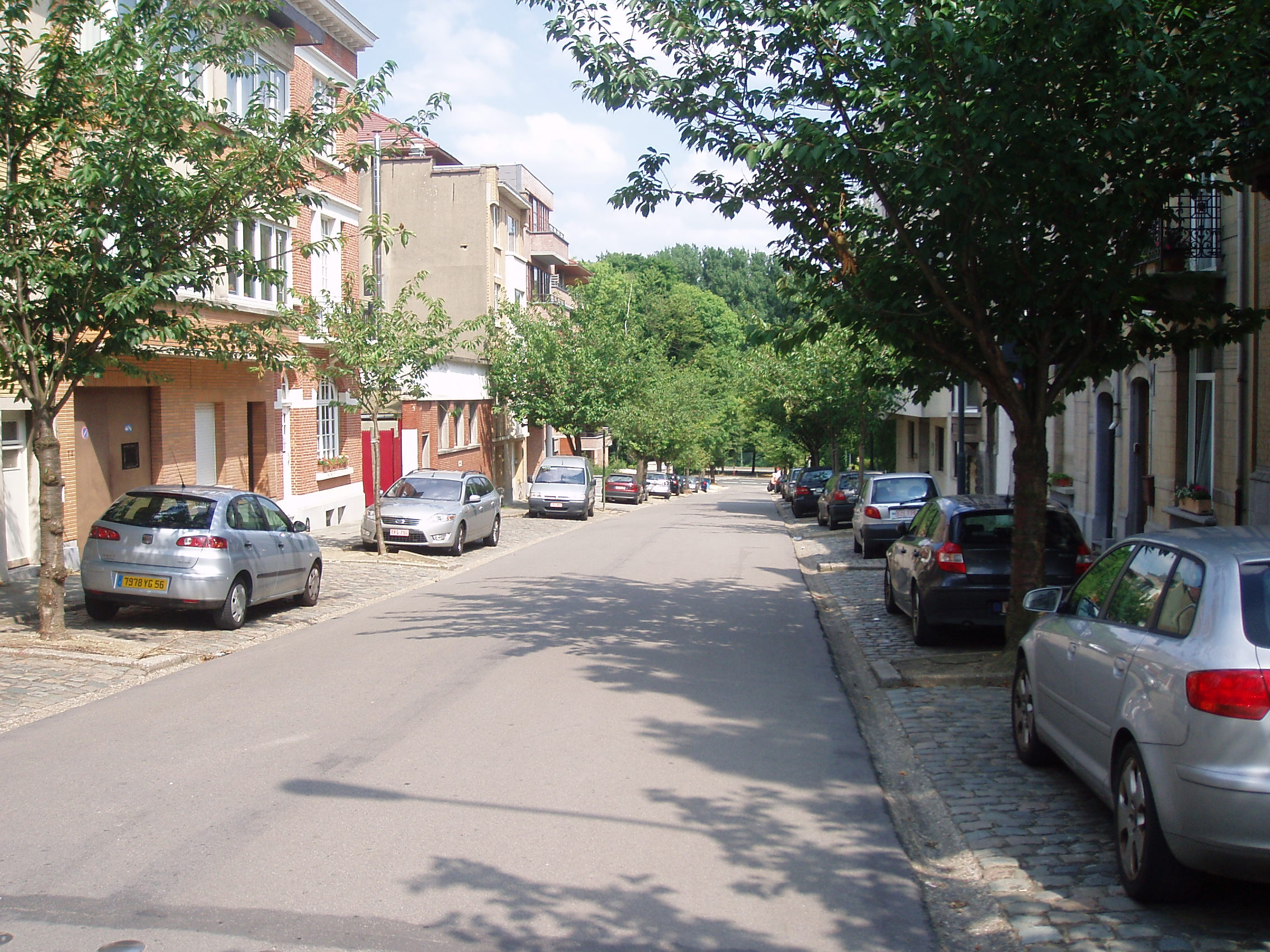 avenue des Nénuphars Auderghem Belgium